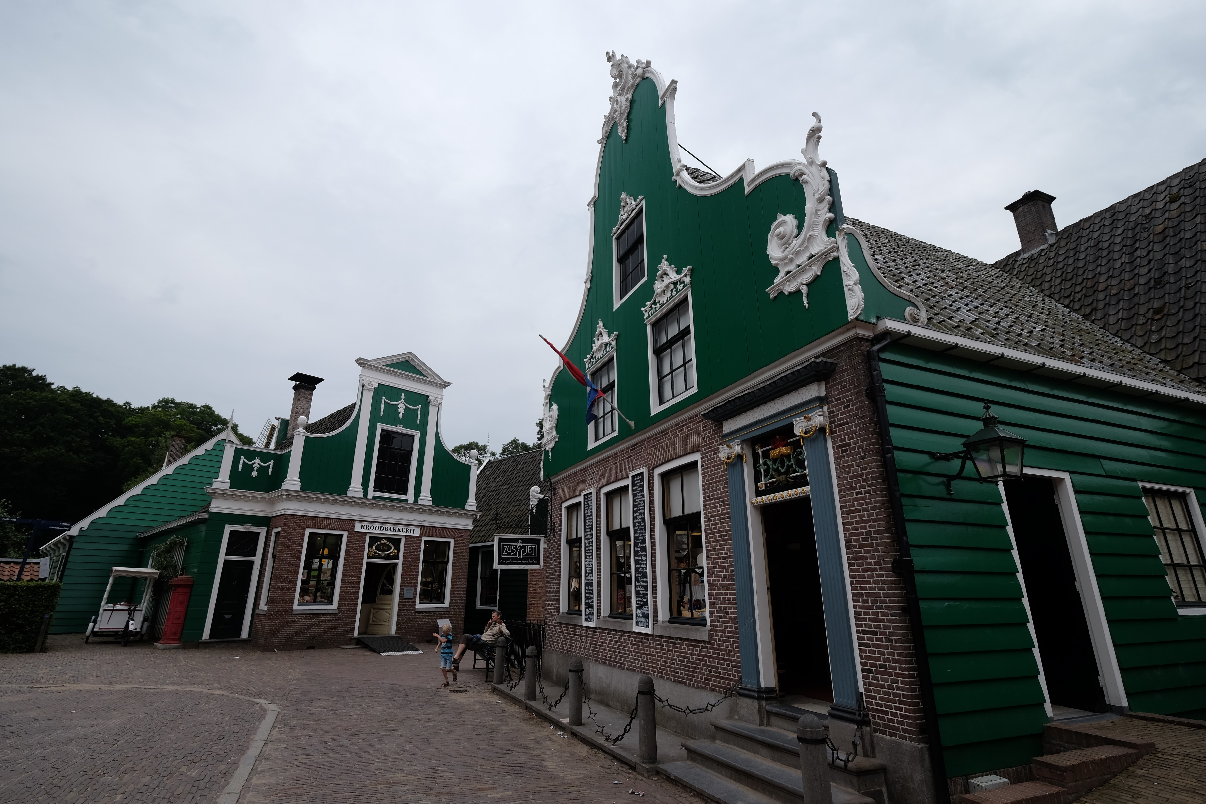 Noordoostelijk van Schaarsbergen, Arnhem, Netherlands